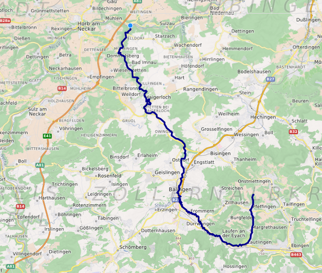 carte réalisée sur umap This map may be incomplete, and may contain errors. Don't rely solely on it for navigation.